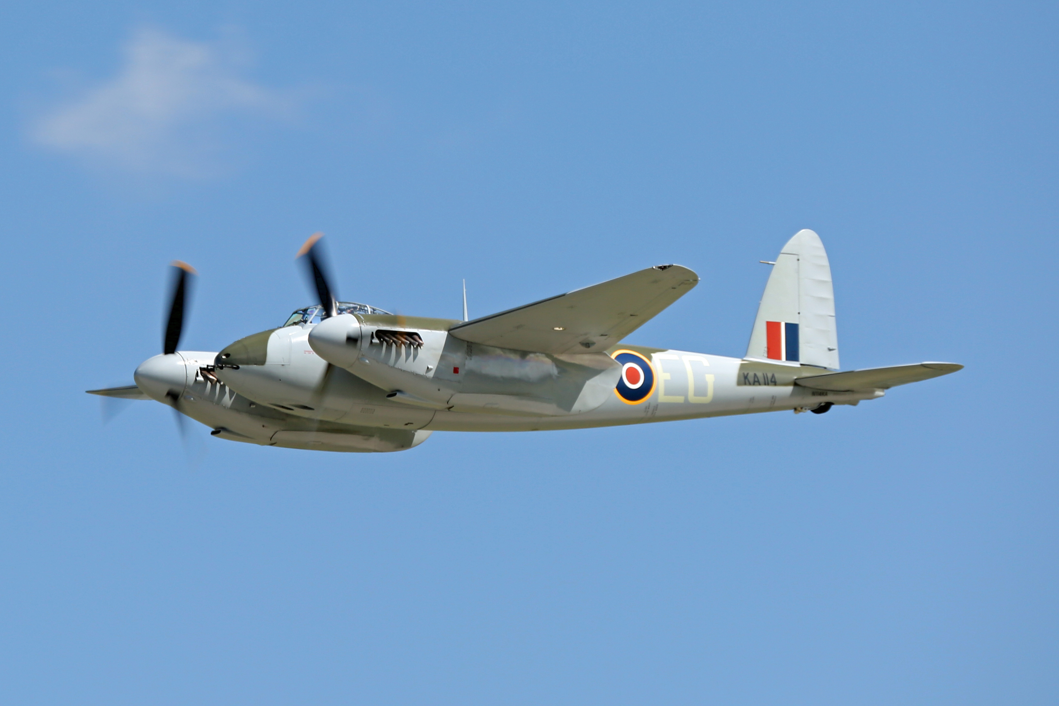 moz15fine